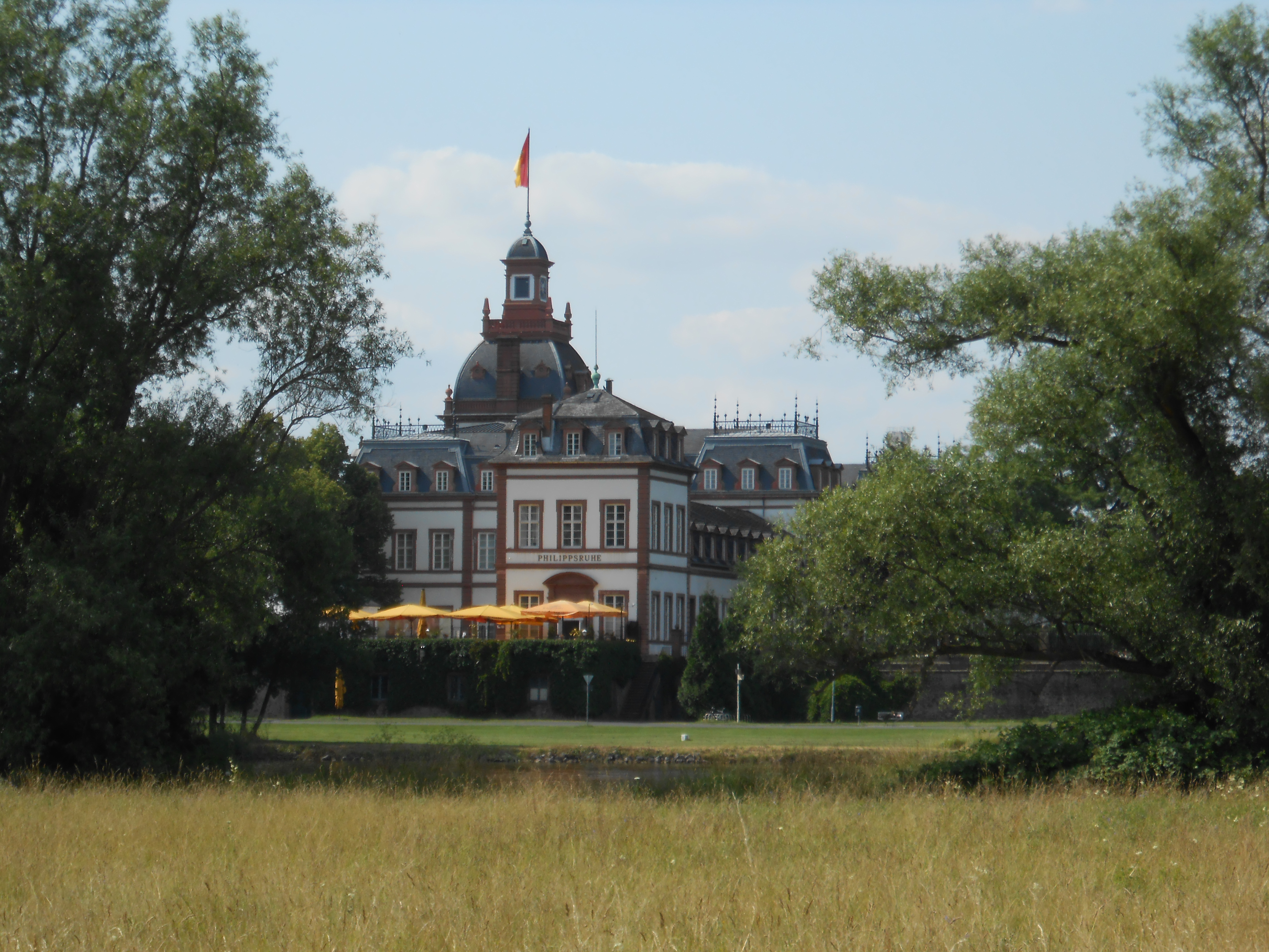 Schloss Philippsruhe vom Steinheimer Mainufer aus